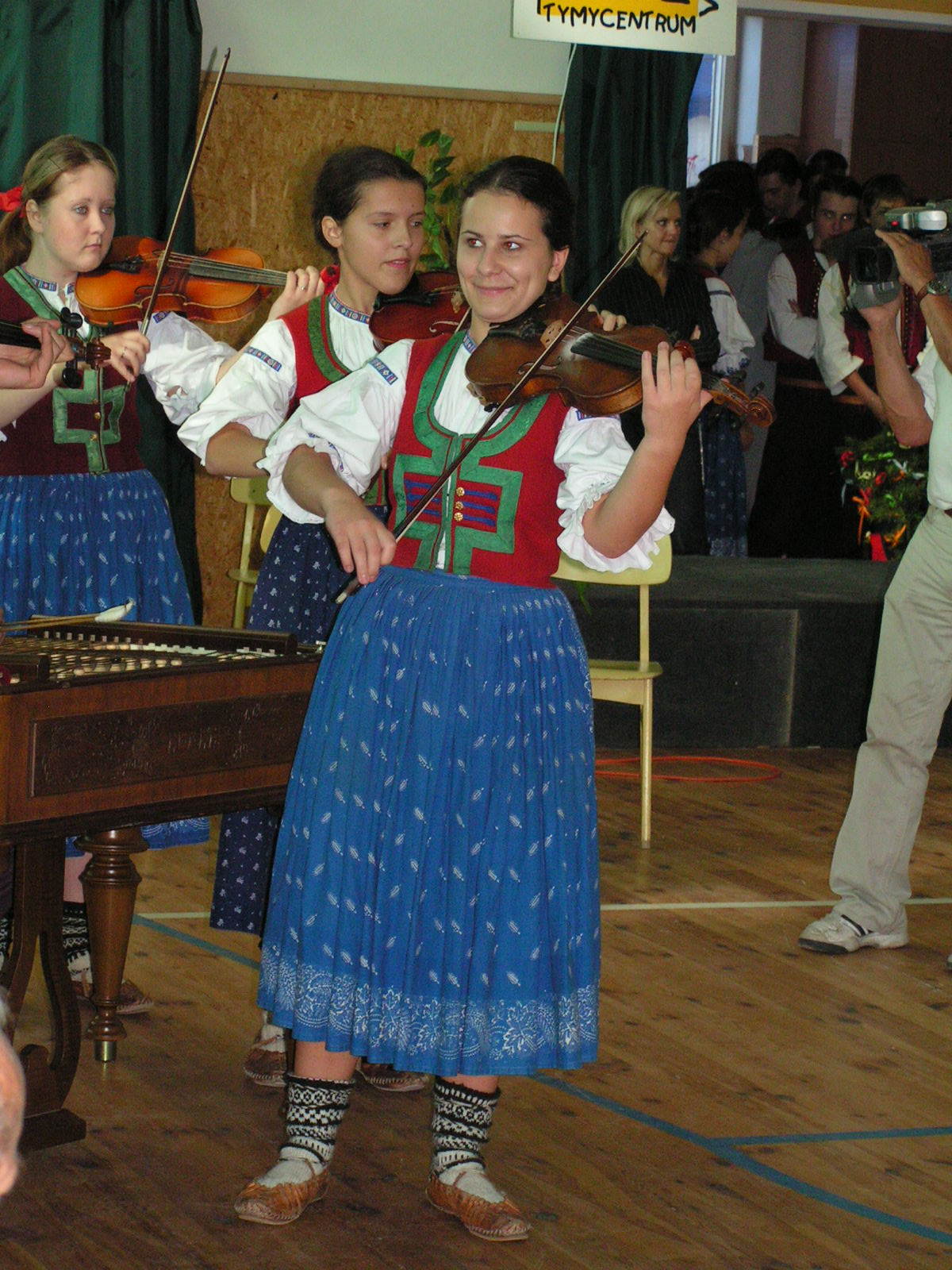 Cimbálová muzika folklórního souboru Malá Rusava na oslavách ve Všetulích.